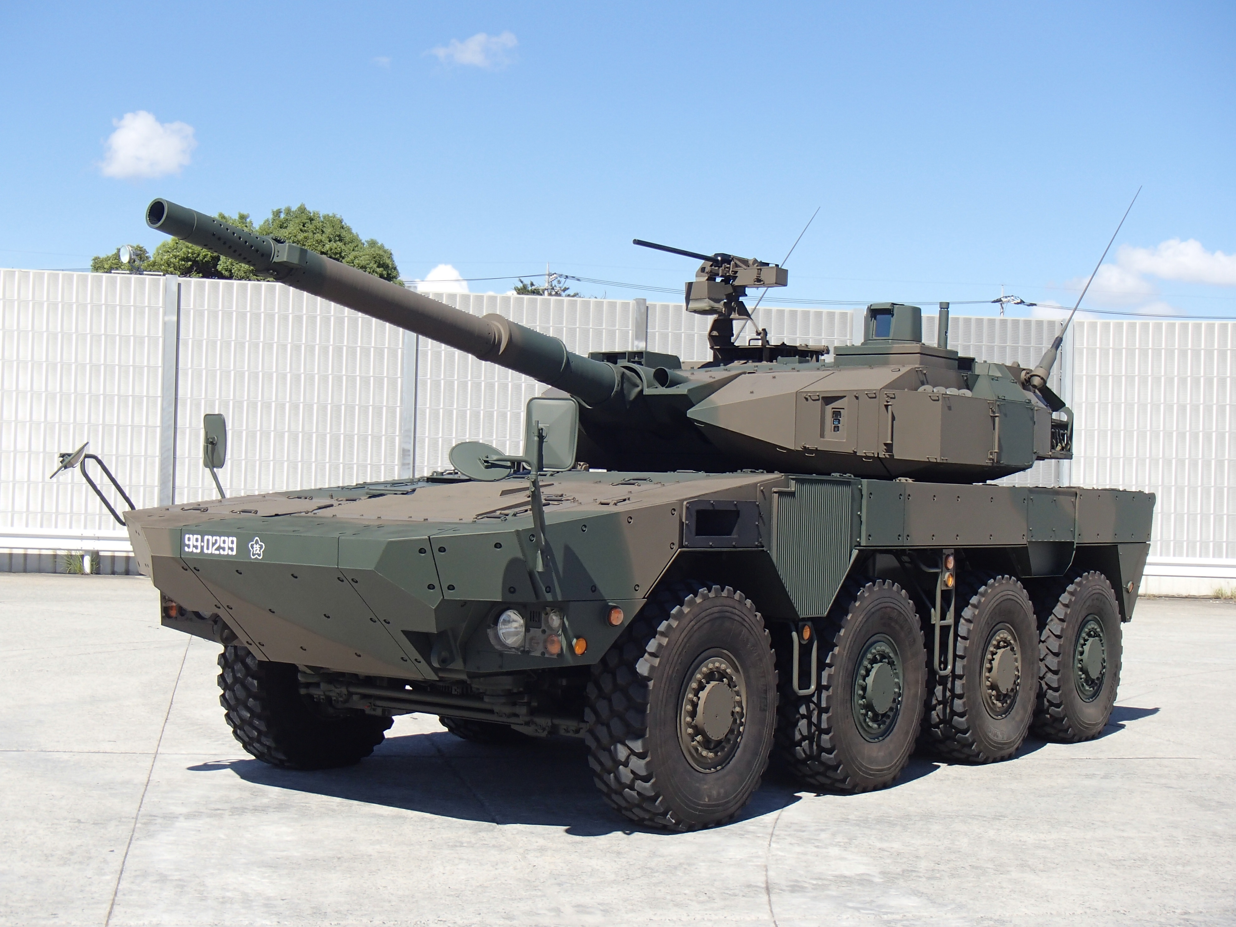 機動戦闘車 多様な事態への対処において、空輸性・路上機動性に優れた機動力をもって展開するとともに、中距離域での直接照準射撃により軽戦車等を含む敵装甲戦闘 車両等を撃破するための装備品です。 現在、防衛省技術研究本部において試験中であり、平成２８年度に装備化される予定です。 性能・諸元 乗員：4名 全備重量：約26t 全長：8.45m 全幅：2.98m 全高：2.87m 最高速度：100km/h エンジン：水冷4サイクル4気筒 ディーゼル機関 570ps/2,100rpm 武装：105mm砲 12.7mm重機関銃 74式7.62mm機関銃